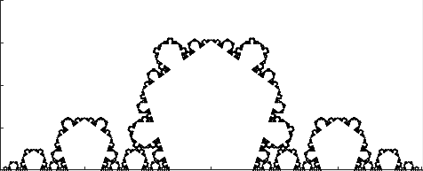 (5,0.2)-curva de von Koch. Fractal obtenido mediante un sistema de funciones iteradas.